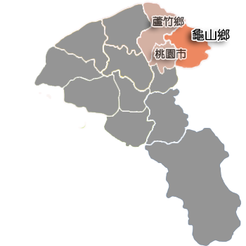 龜山鄉相對位置